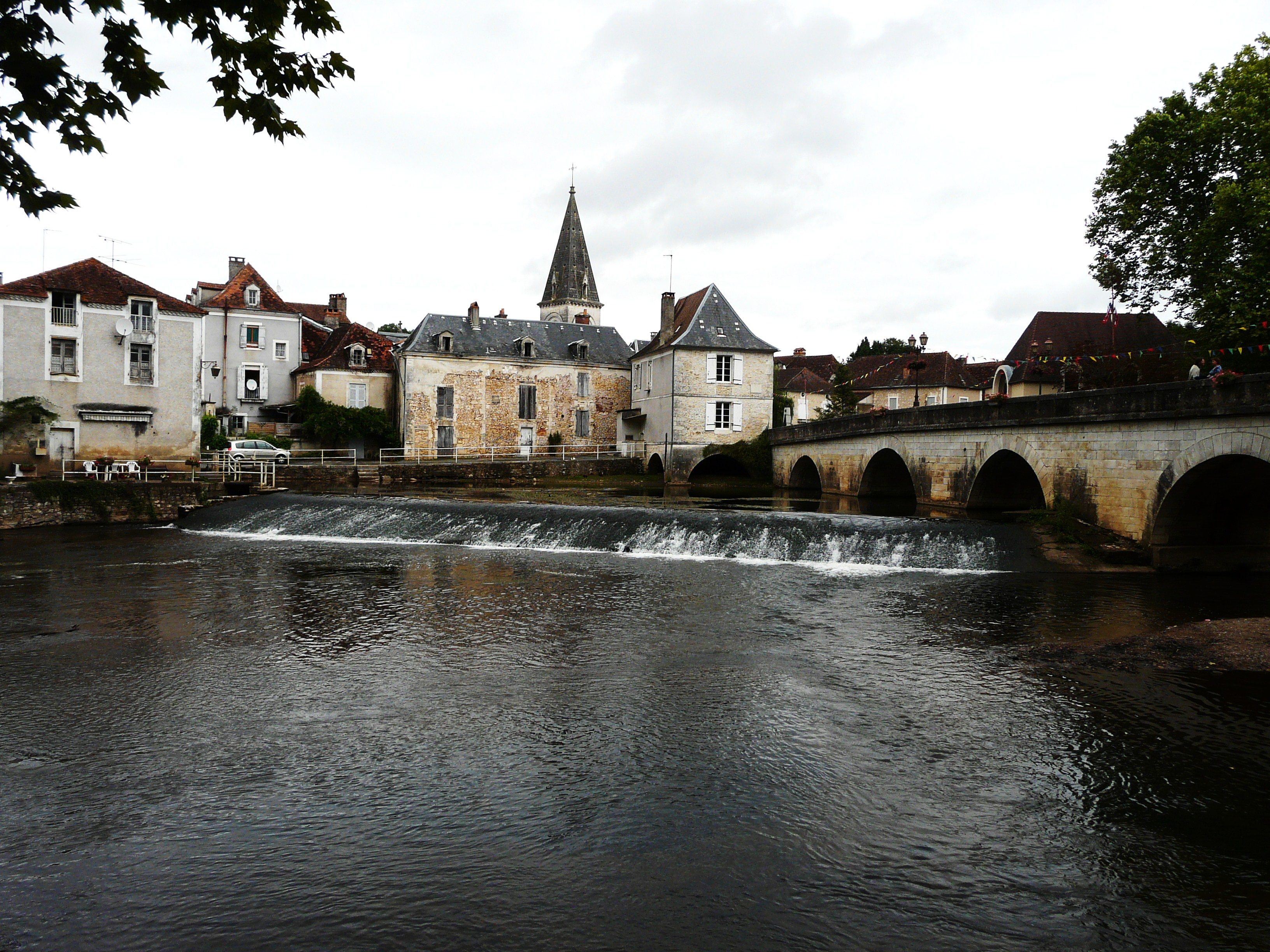 L'Auvézère à Cubjac